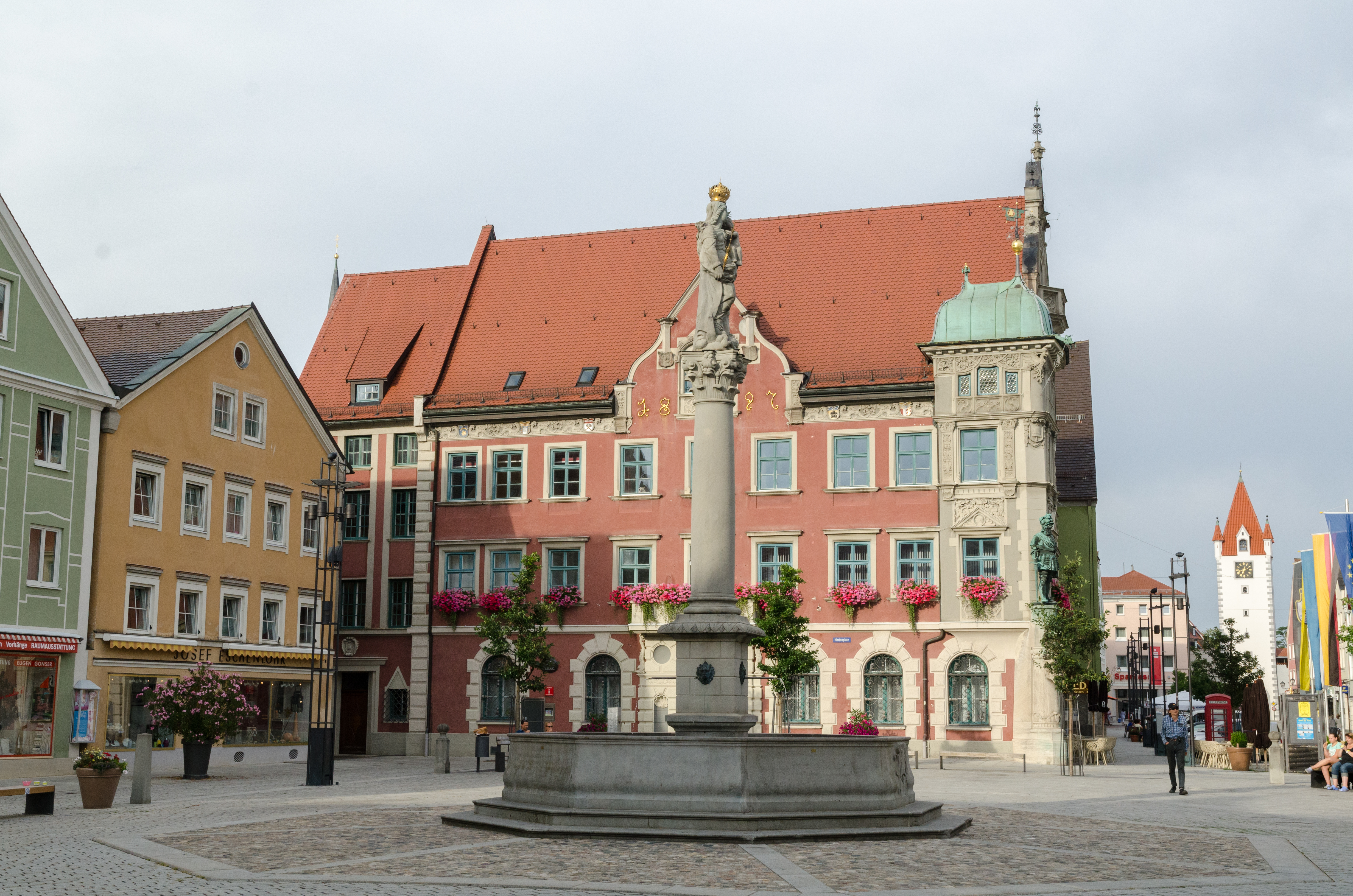 Mindelheim, Marktplatz